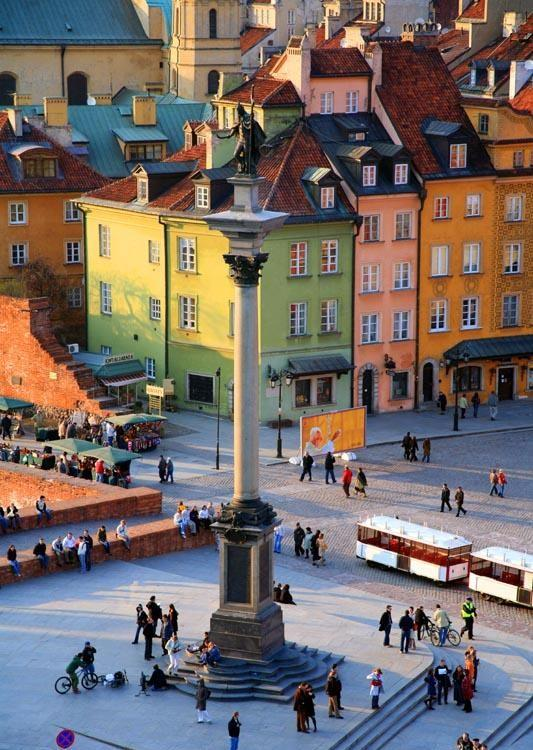 Warszawa (Polska)